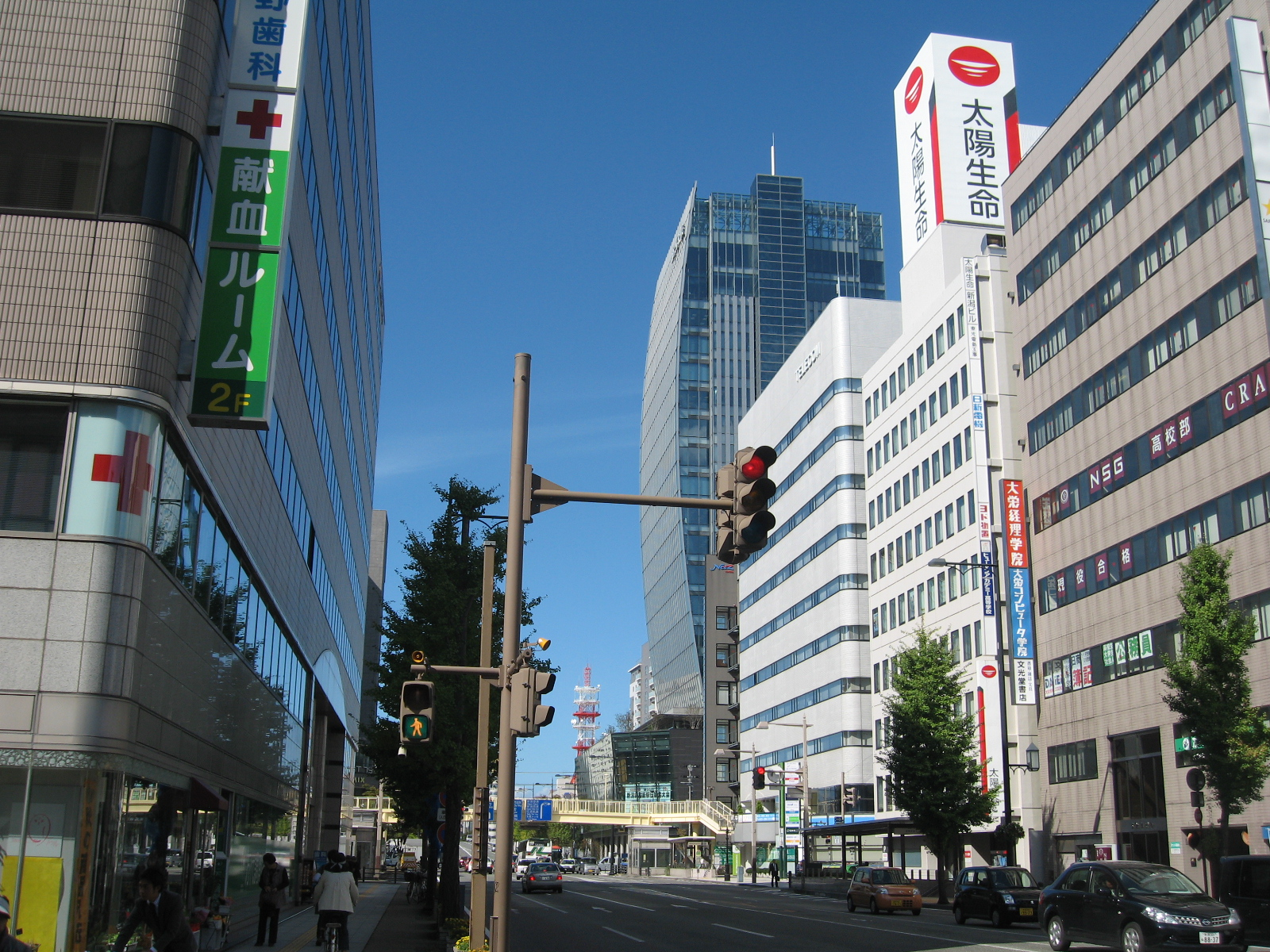 萬代橋通の画像。